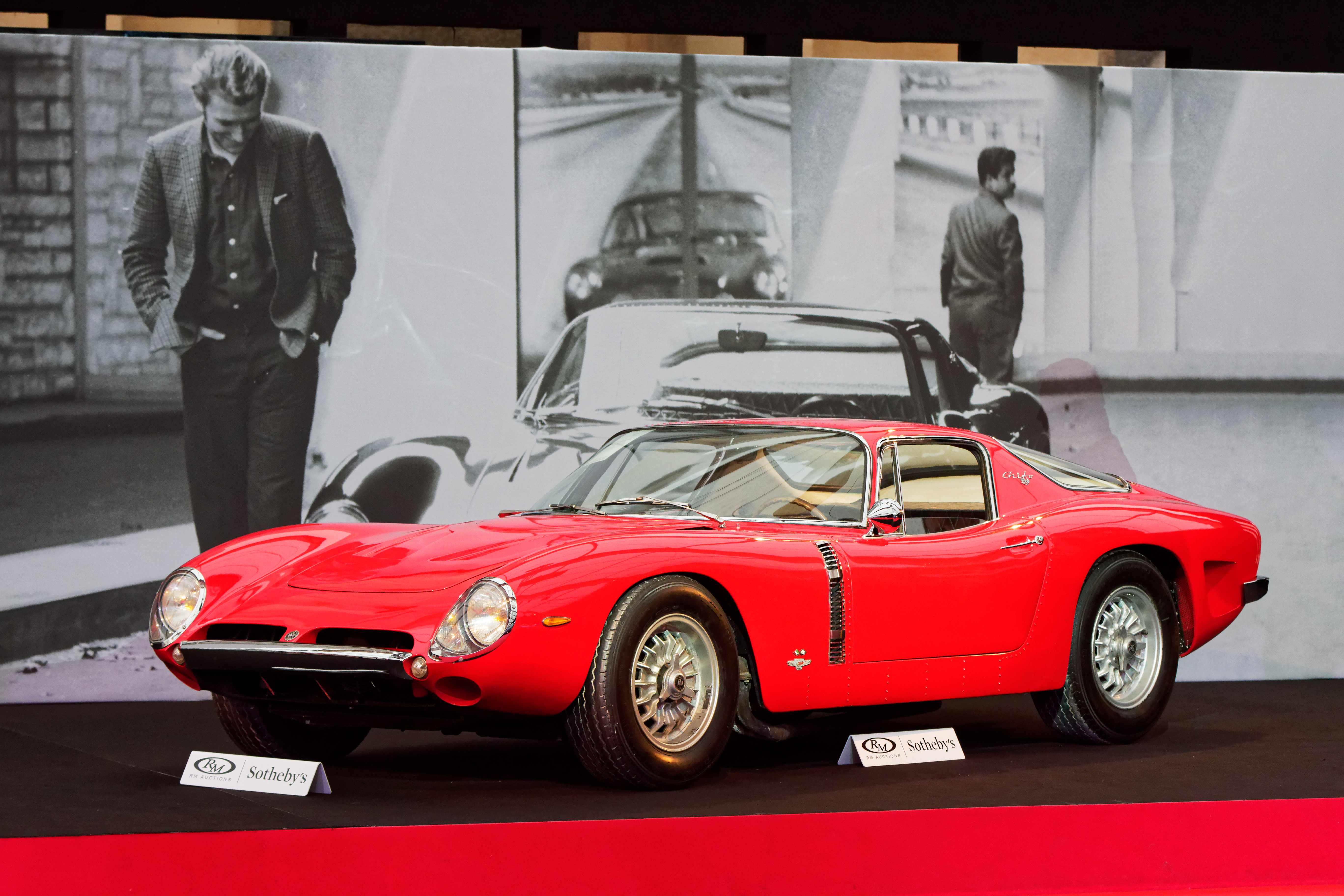 Un véhicule exposé lors de la vente RM Sotheby’s 2018 aux Invalides à Paris.